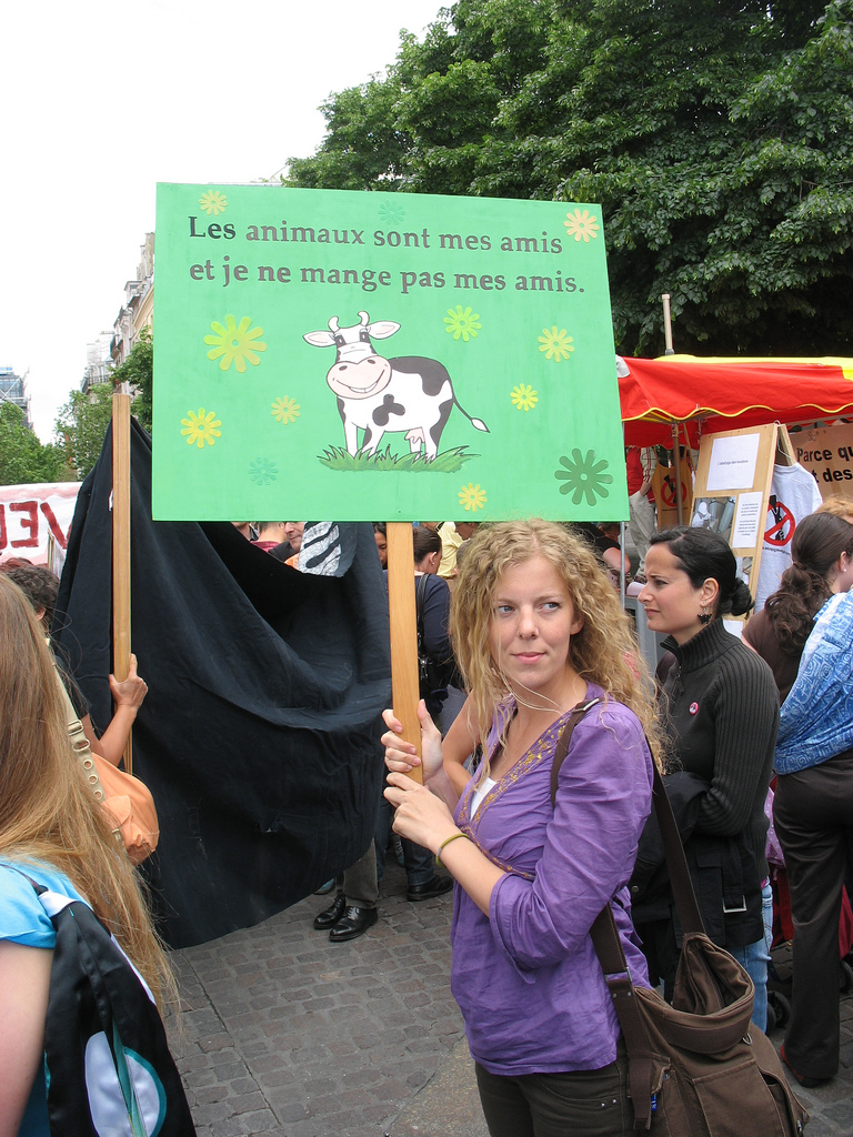 Veggie Pride. 2008. Paris